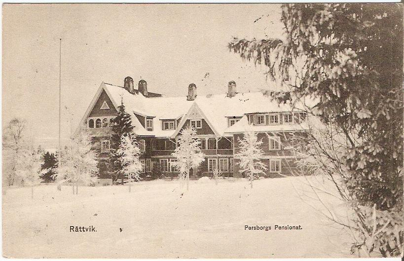 Persborgs hotell, Rättvik. Arkitekter: Isak Gustaf Clason och Albert Collett